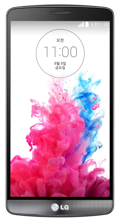 LG전자, SKT 전용 ‘LG G3 A’ 8일 출시 ■ SKT 특화 UX인 ‘T액션’, ‘안심클리너’ 업계 첫 적용 □ 손목 스냅을 이용한 한번의 폰 회전-역회전 동작으로 전화받기, 셀카찍기 등이 가능한 ‘T액션’ □ 도난방지, 폰 자동 최적화 기능을 갖춘 ‘안심클리너’ ■ ‘G3’에서 호평 받았던 디자인, 카메라, UX(사용자 경험) 계승 □ 5.2인치 IPS 풀HD 디스플레이, 후면키 디자인 □ 레이저 오토 포커스, OIS플러스 기능 탑재한 1,300만 화소 카메라 □ ‘G3’ 대표 UX인 노크 코드, 스마트 키보드, 스마트 알림이 등 탑재 ※ Social LG전자 ( 에서 관련 보도자료를 확인하실 수 있습니다.